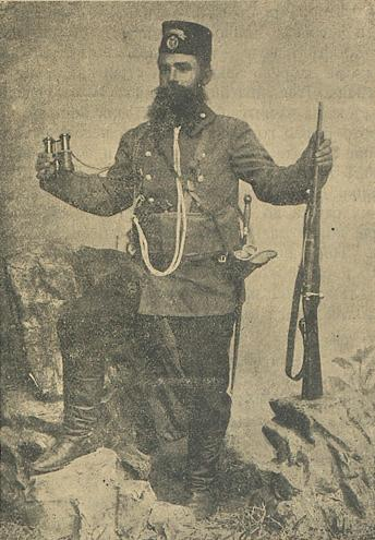 Дончо Златков.